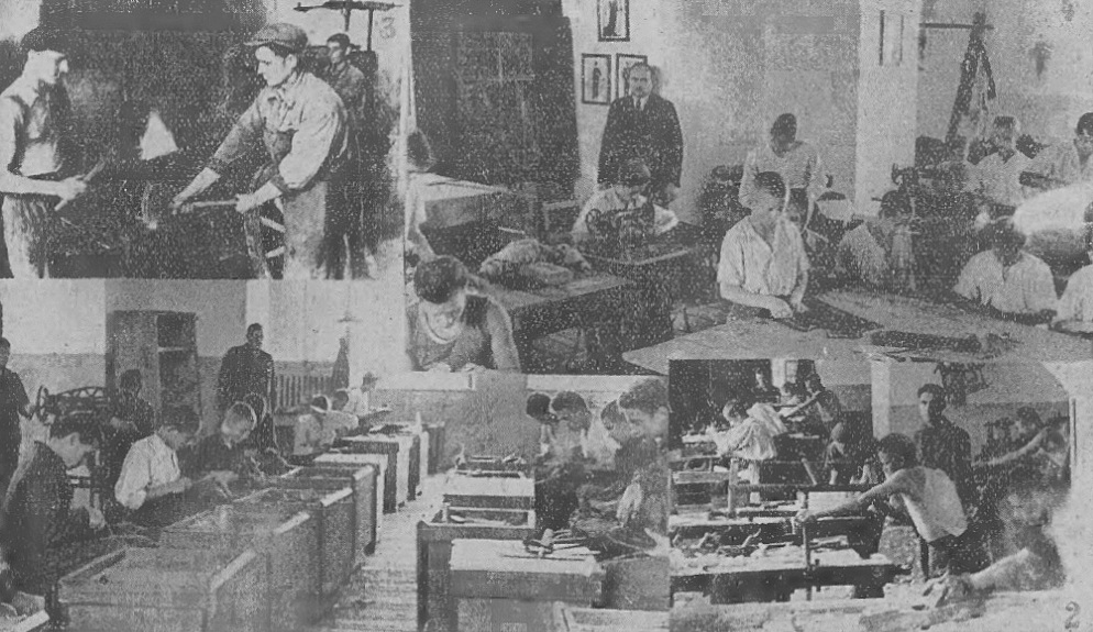 Zakład Sierot i Ubogich w Drohowyżu. Warsztaty: 1 - szewski, 2 - stolarski, 3 - kuźnia, 4 - krawiecki.